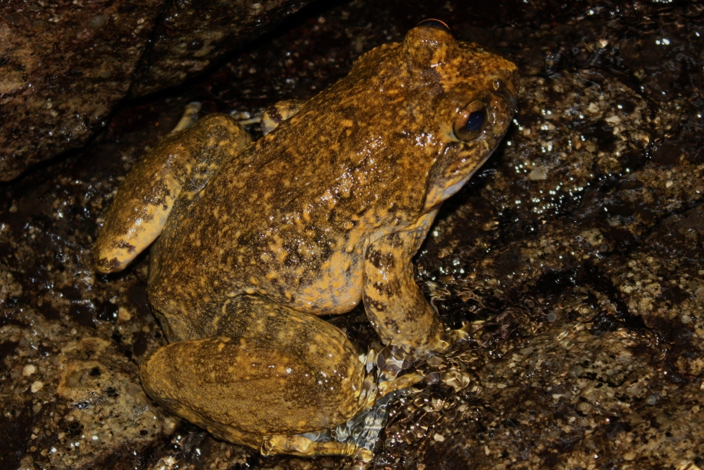 Quasipaa spinosa, syn. Paa spinosa, Giant Spiny Frog. Taken at Tai Mo Shan.